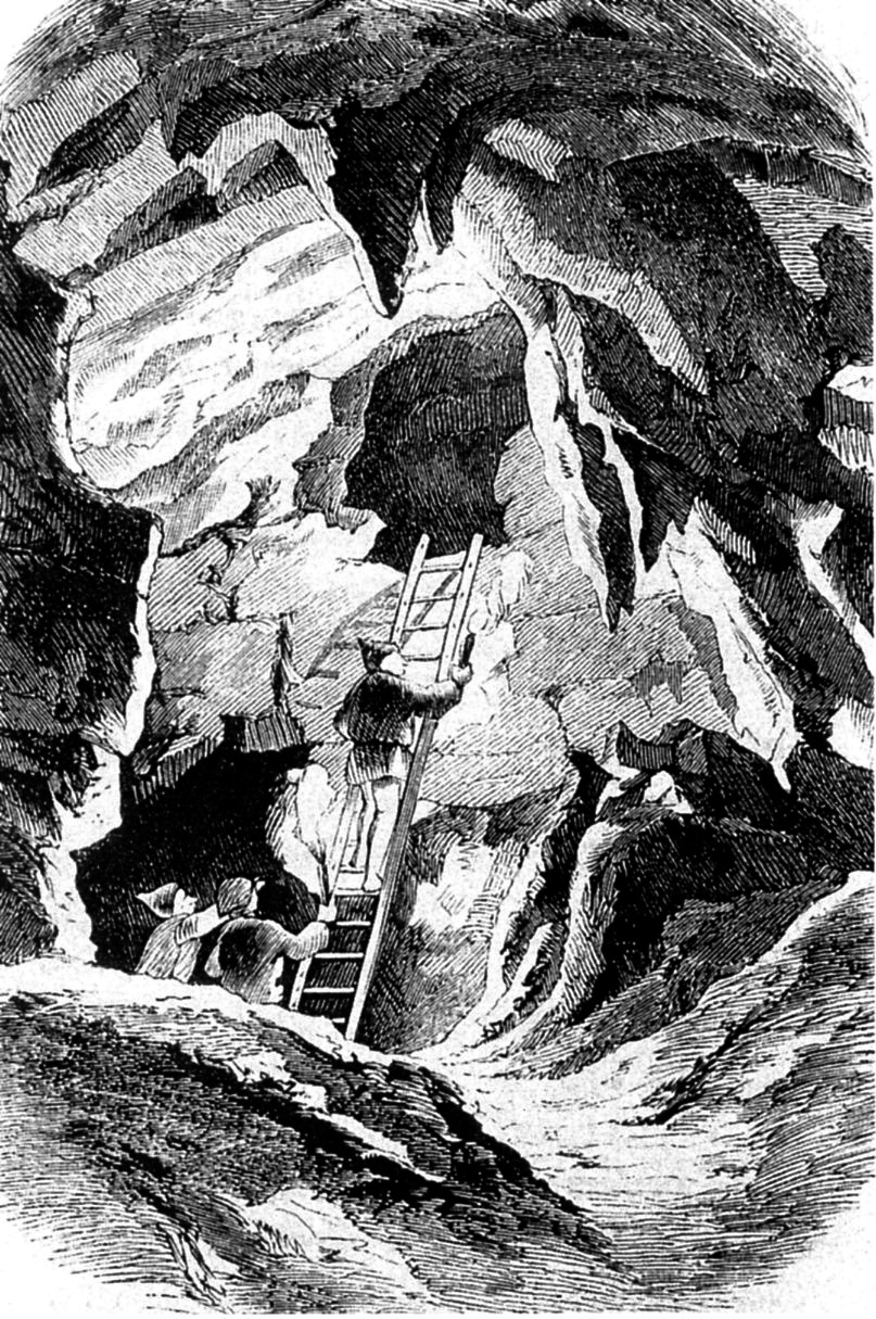 Erdmannshöhle Hasel - Holzstich von Karl Harveng